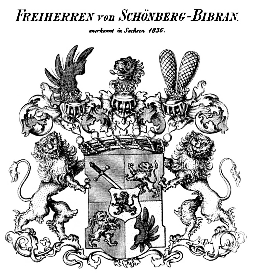 Wappen Schönberg Bibran 2 - Tyroff AT.jpg